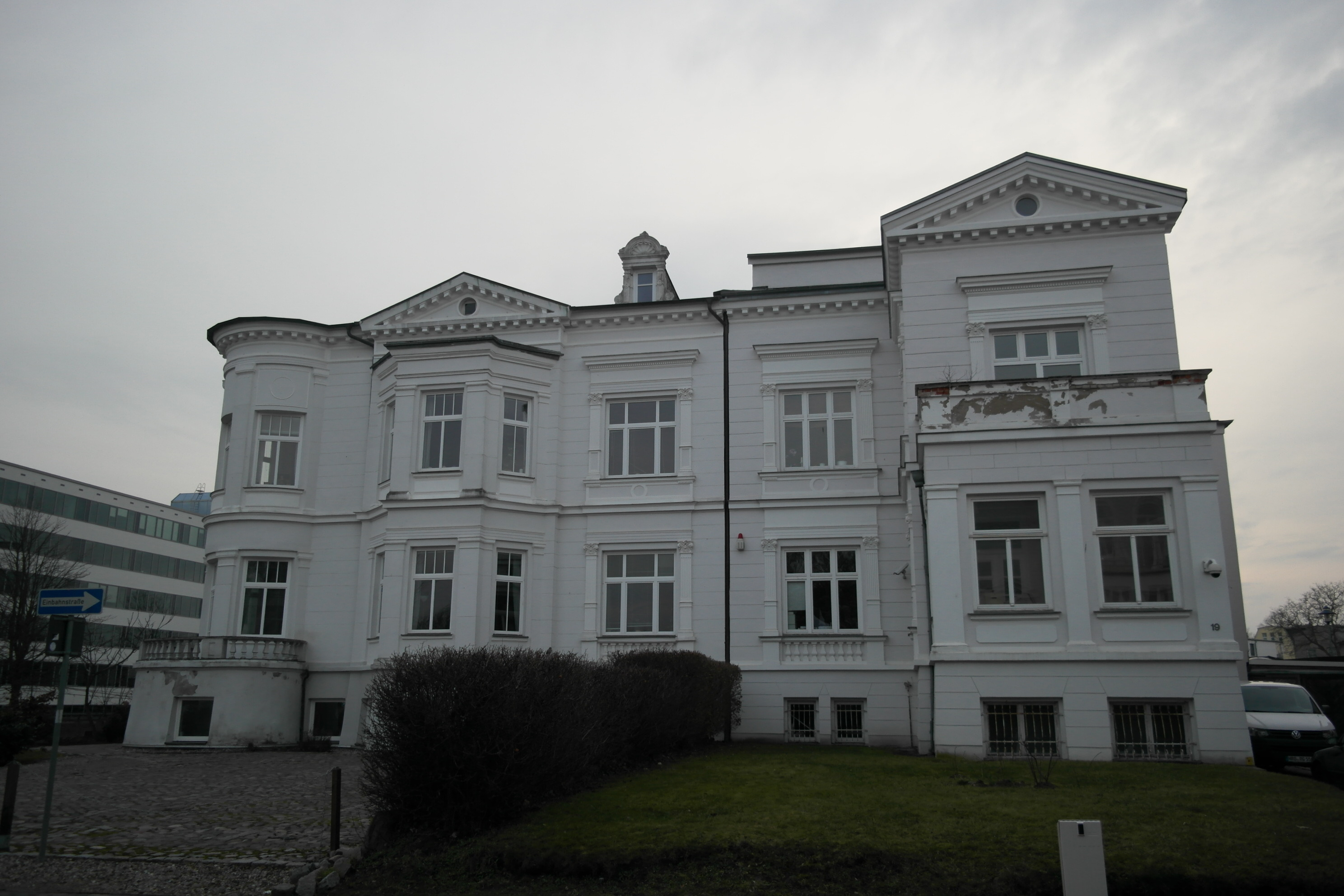 denkmalgeschütztes Wohnhaus in Rostock, Thomas-Mann-Str. 19